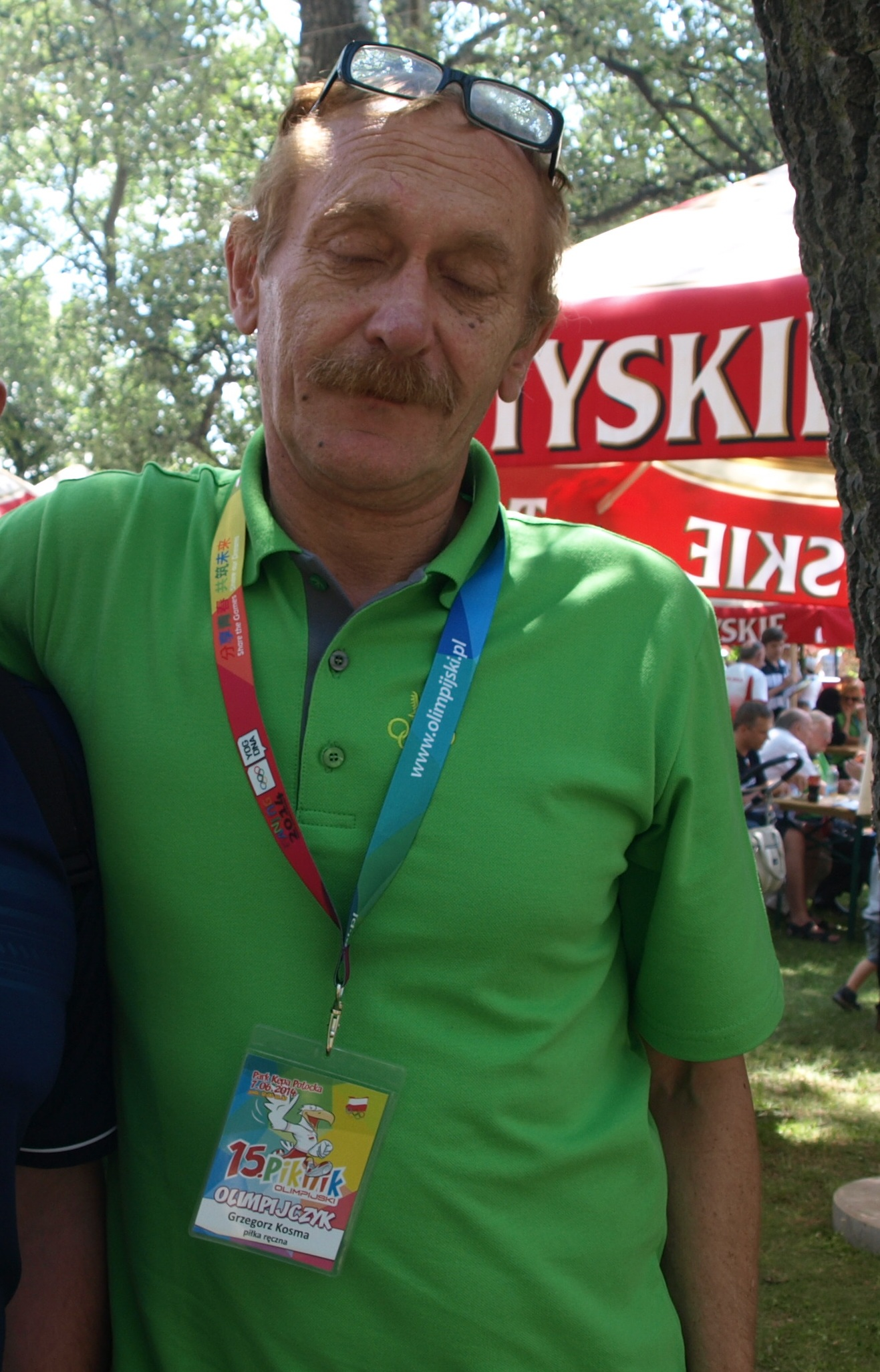 Grzegorz Kosma